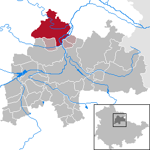 Kindelbrück in Thuringia - District Sömmerda